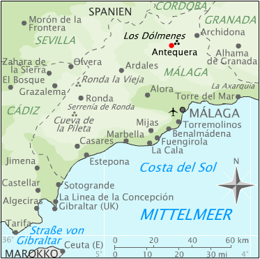 Lage von Antequera in der andalusischen Provinz Málaga (Spanien)